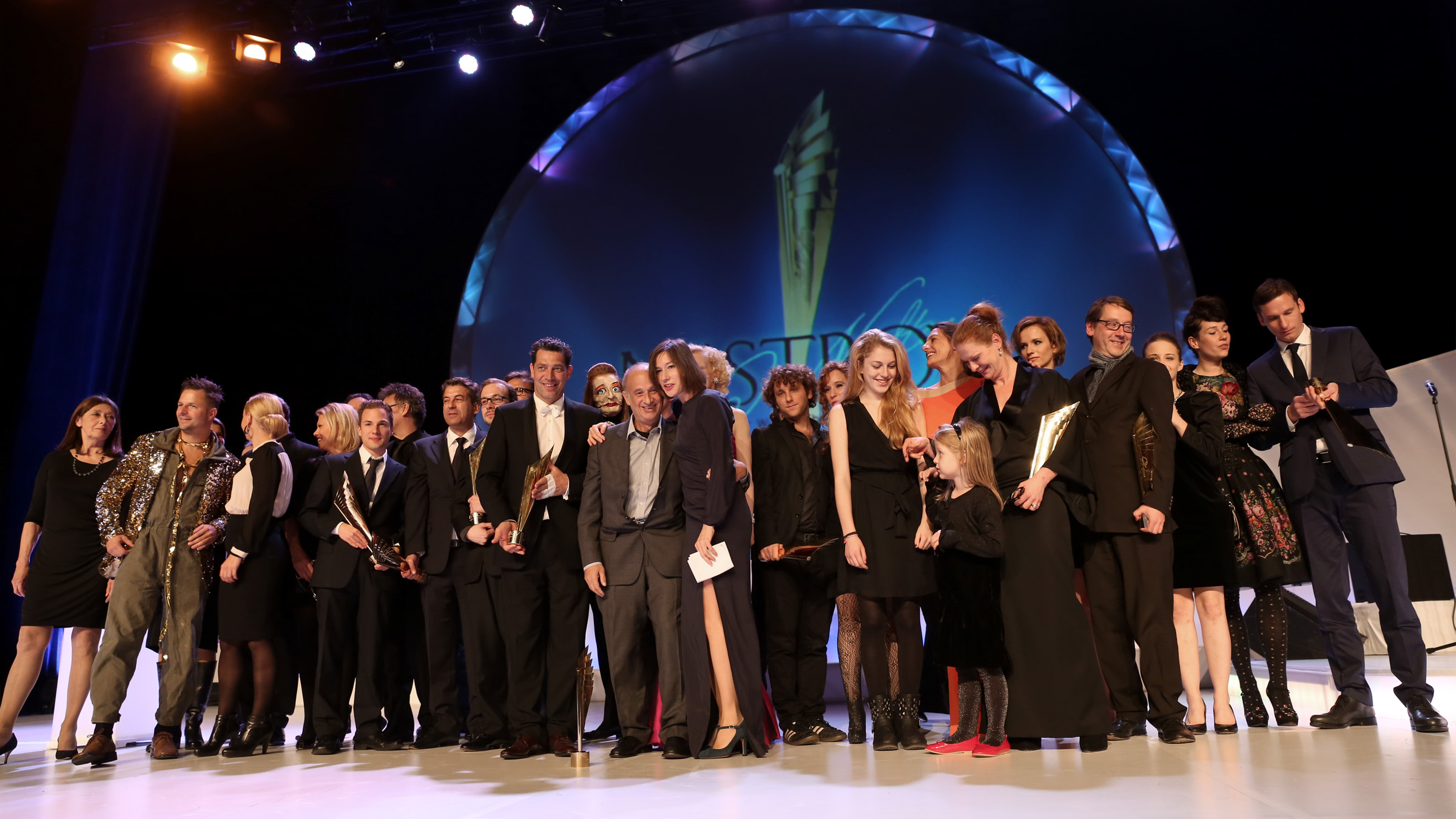 Preisträger und Nominierte des Nestroy-Theaterpreises 2013 in der Halle F der Wiener Stadthalle (Wien, Österreich).